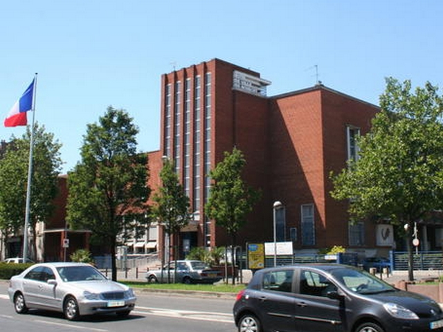 L'Hôtel de ville du Bourget (Seine-Saint-Denis)